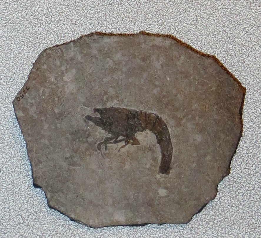 Fossil of Longichela, an extinct crustacean- Took the picture at Museo di Scienze Naturali, Bergamo